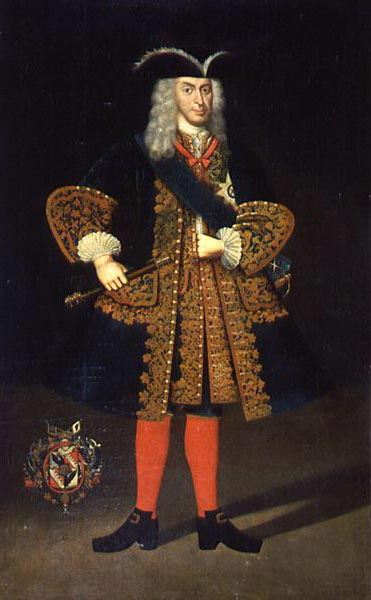 Hеизвестный художник середины ХVIII векаПортрет Г.П. ЧернышеваГТГ